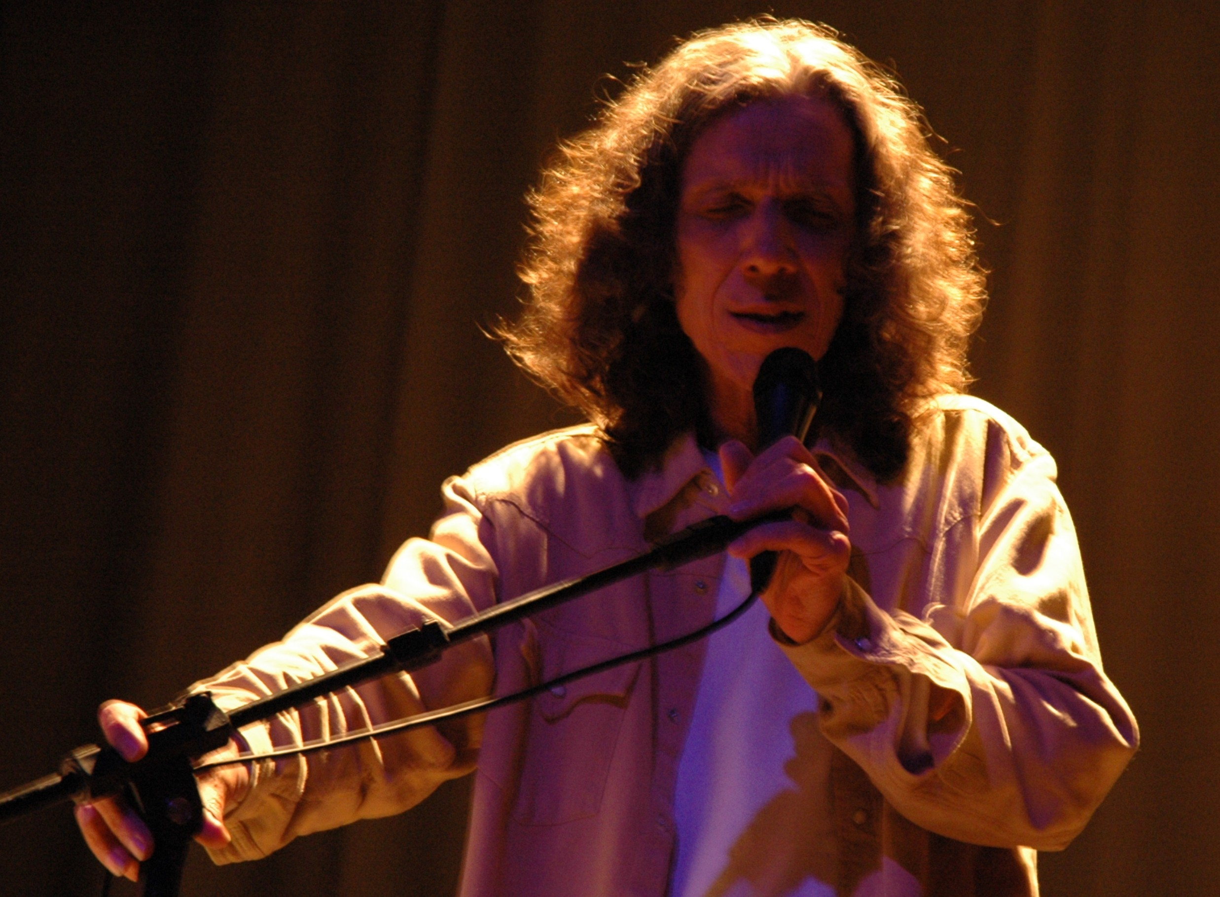 Galileu Arruda, por Lu Engel (Show Teatro Túlio Piva, 2003)